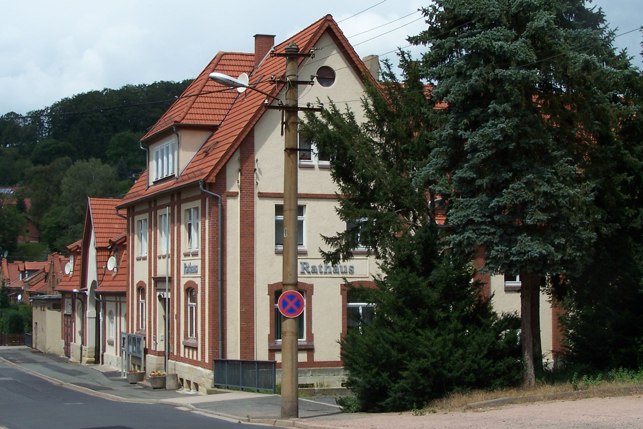 Ansichten und Details zum Rathaus der Gemeinde Schweina.